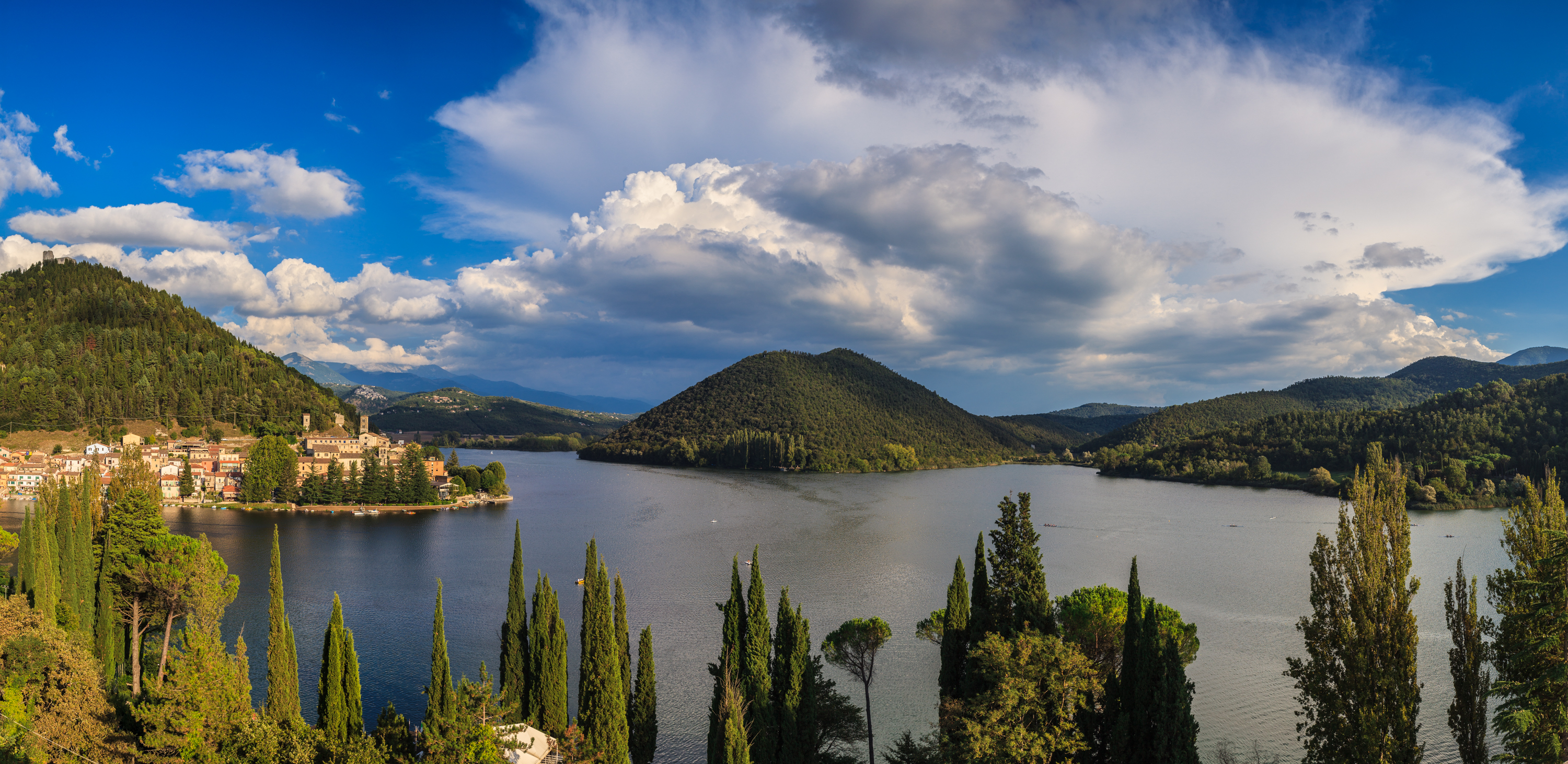 lago di Piediluco This is a photo of a monument which is part of cultural heritage of Italy.